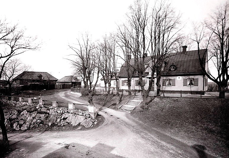 Paschs malmgård huvudbyggnad